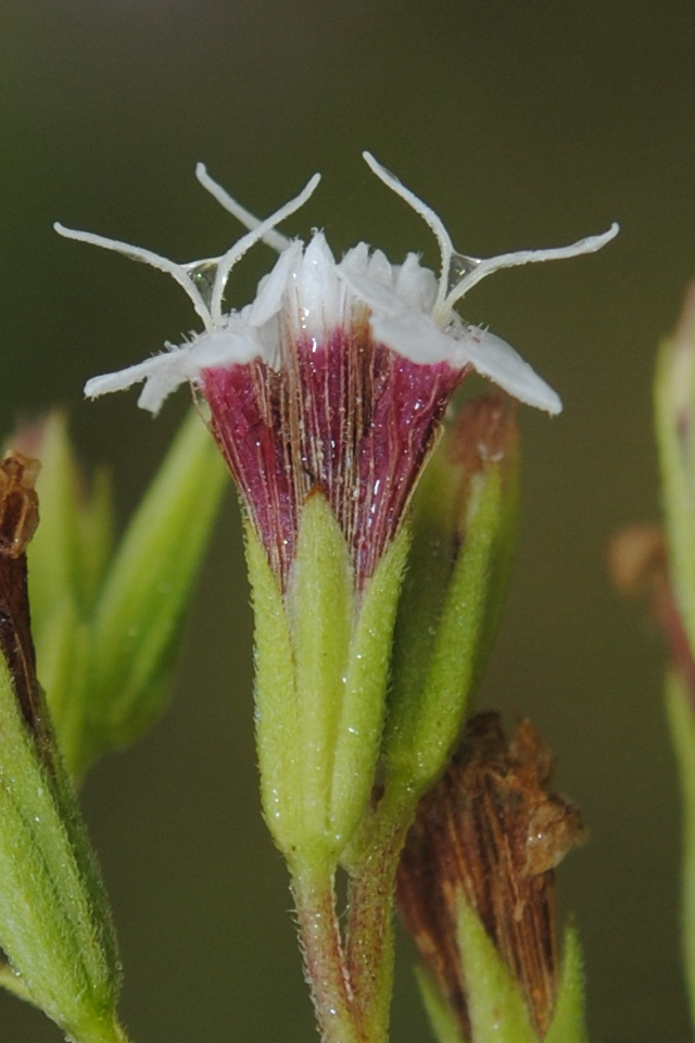 Stevia aristata. Fotos tomadas al margen de pajonal cercano a la balsa y sobre suelo arenoso al margen de la Cañada de las Pajas en Palmar, departamento de Soriano, Uruguay.